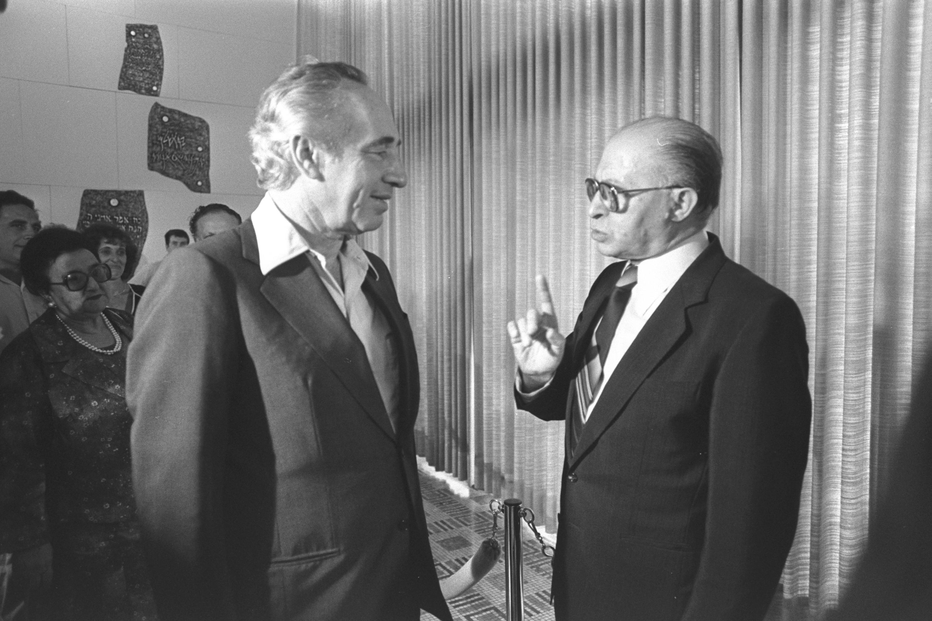 Prime Minister Menahem Begin and Chairman of the Alignment Party Shimon Peres at the ceremony held by President Yitzhak Navon after the inaugural session of the 10th Knesset. שיחה בין ראש הממשלה מנחם בגין (מימין) ליו"ר המערך ח"כ שמעון פרס בקבלת פנים שערך נשיא המדינה לאחר פתיחת מושב הכנסת ה-10, בבית הנשיא בירושלים.